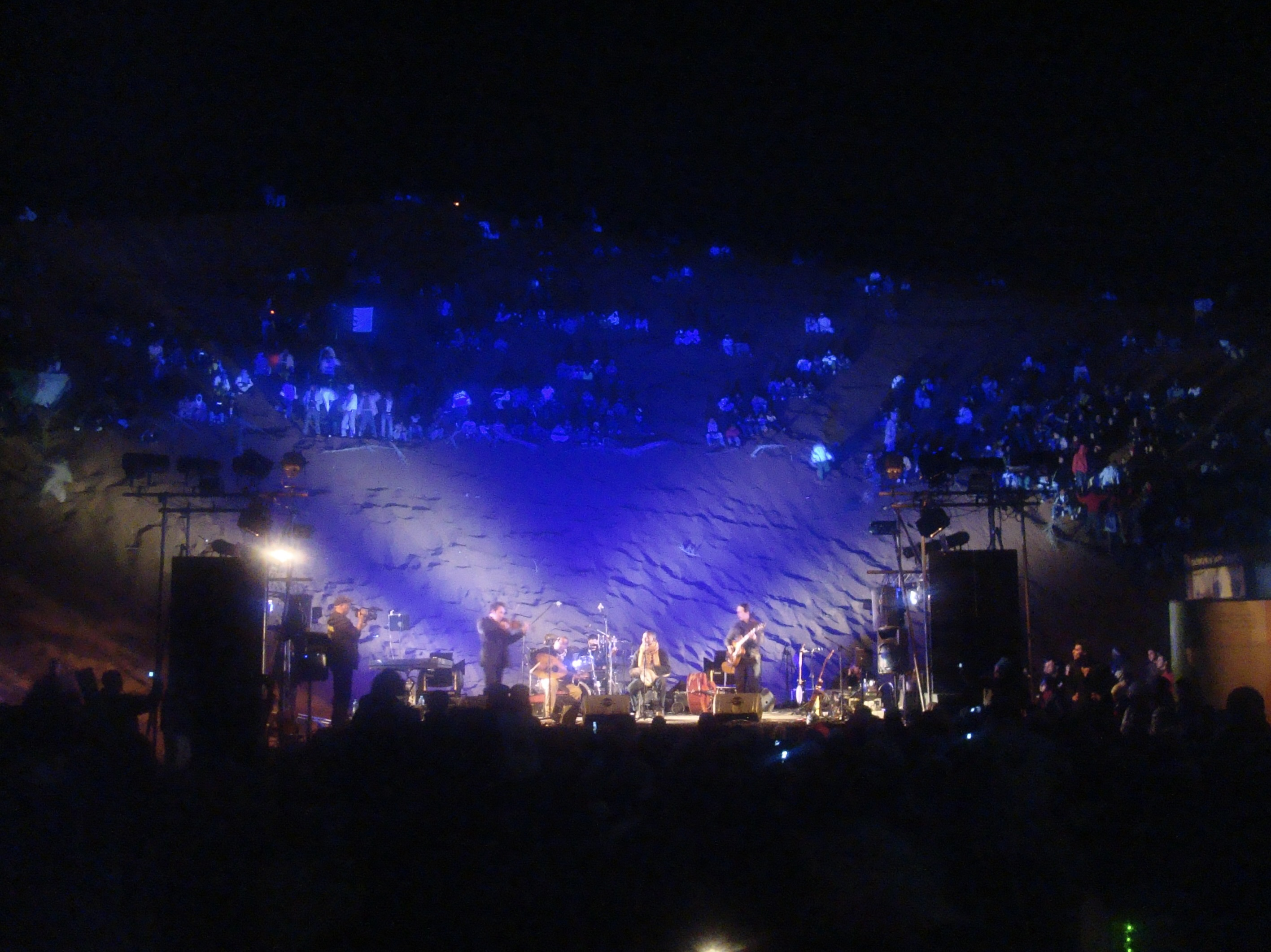 Une soirée des Nuits de la Saoura à Béni-Abbés en Algérie.